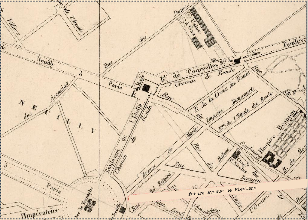 extrait de " Les opérations de voirie par Théodore Jacoubet, architecte - Extension de Paris en 1860 (loi du 16 juin 1859). Opérations de voirie exécutées de 1854 à 1870. Paris avant l'annexion 8402 ha 56 a 07 ca - après 7949 ha 43 a 85 ca au 1/16 000